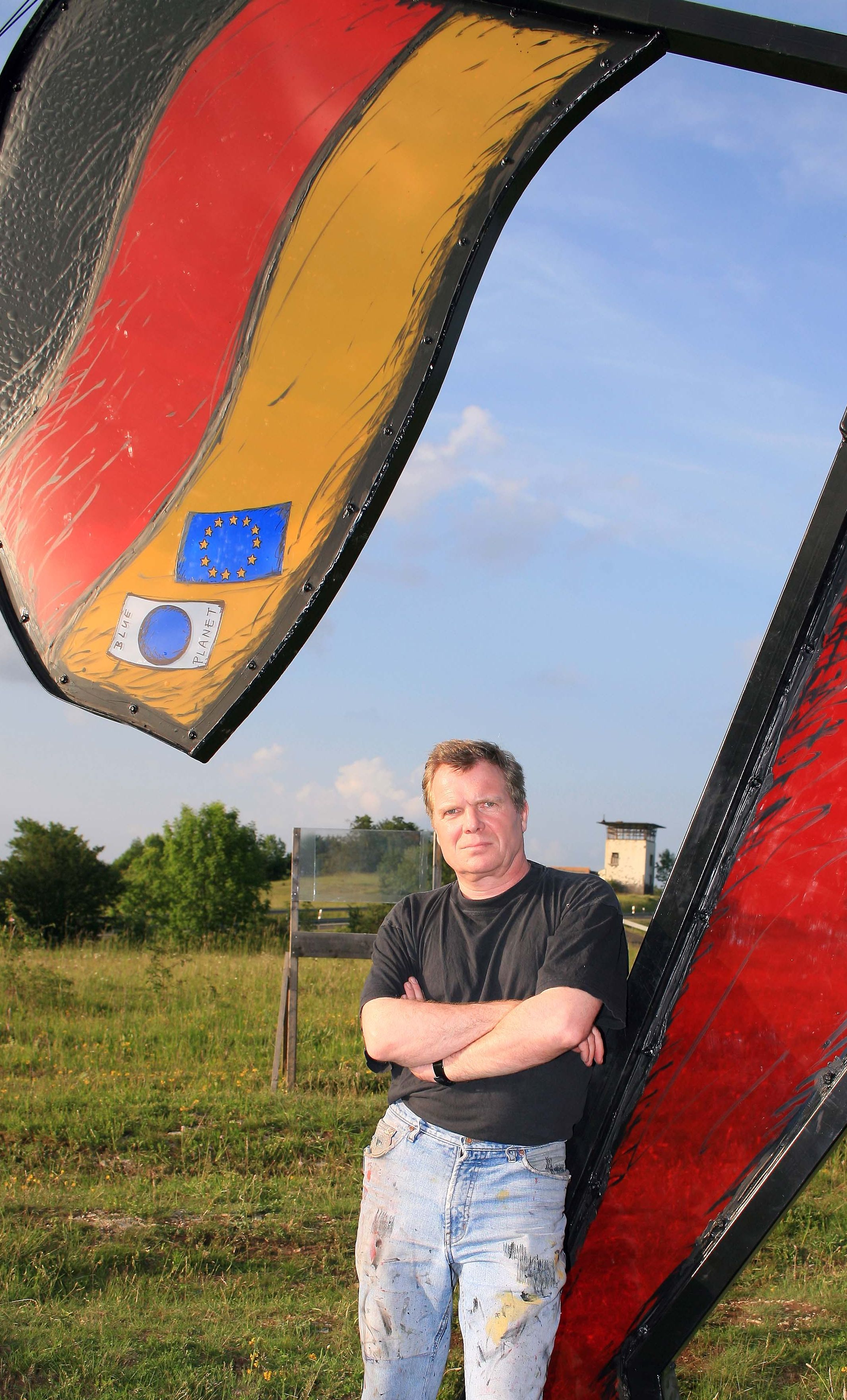 Fotografie von Jimmy Fell im Nationaldenkmal Skulpturenpark Deutsche Einheit